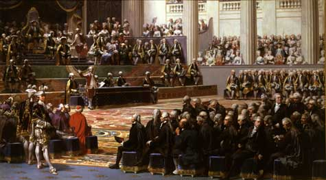 Ouverture des États généraux à Versailles aux Menus-Plaisirs le 5 mai 1789